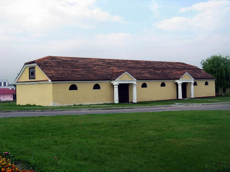 Конюшни